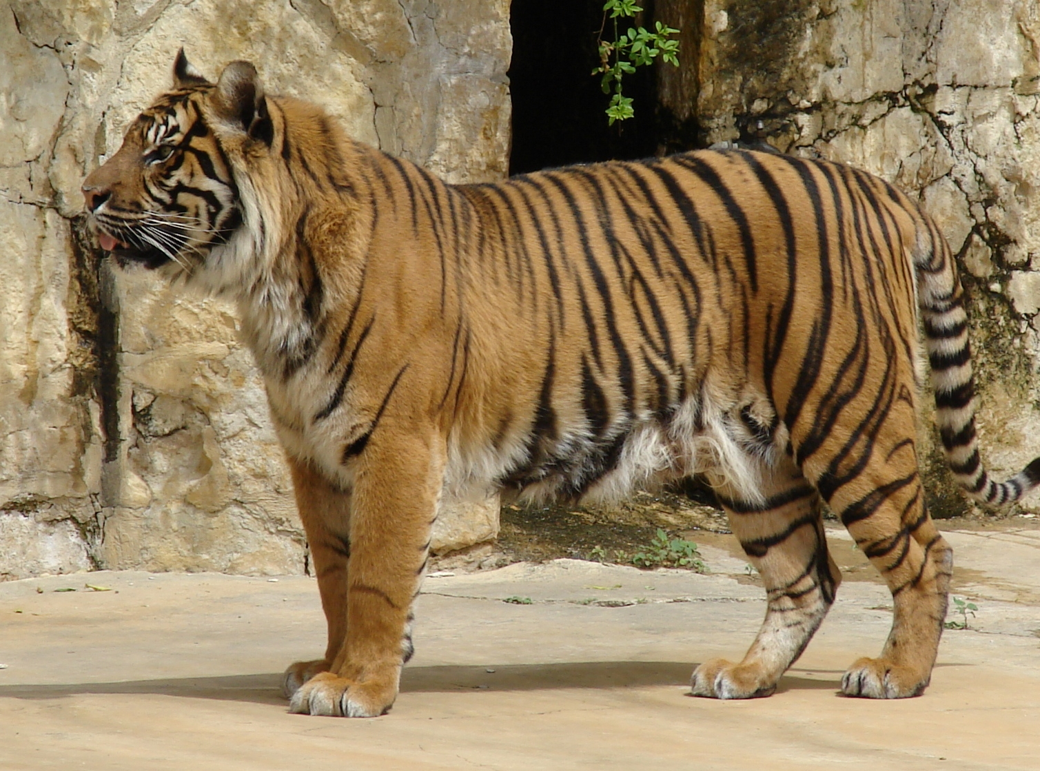 Taken at San Antonio Zoo